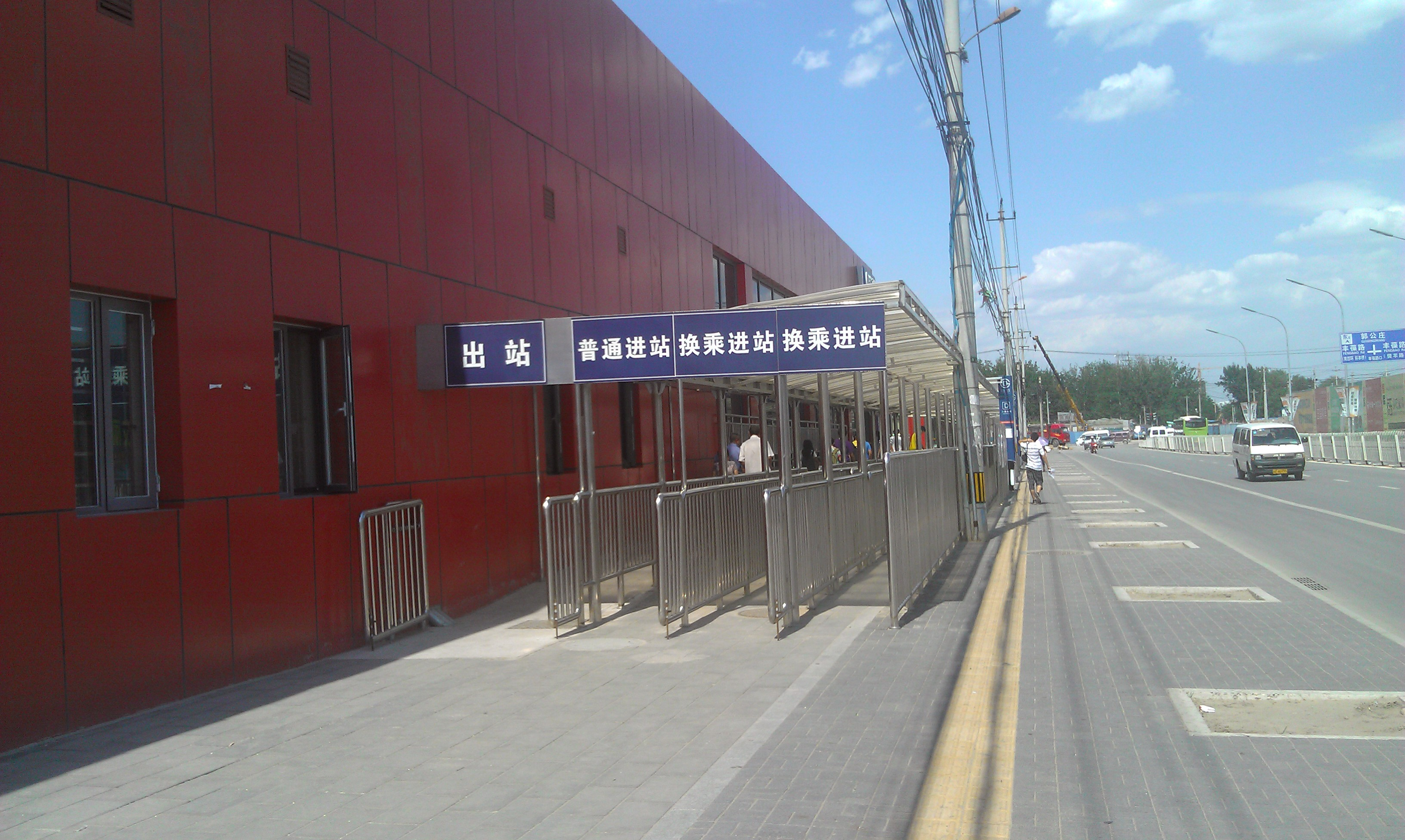 北京地铁大葆台站站外